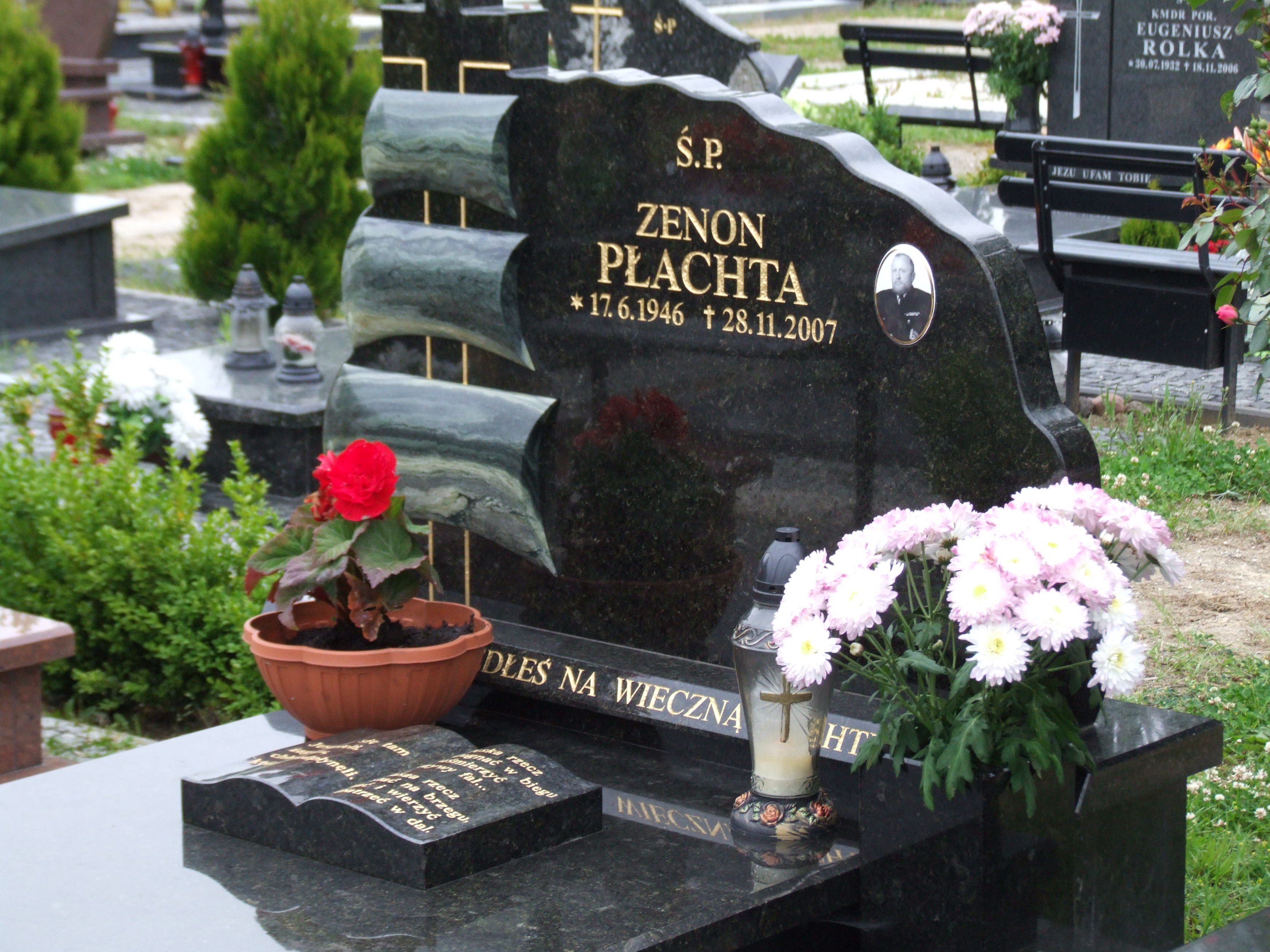 Gdynia-Oksywie Cmentarz Marynarki Wojennej